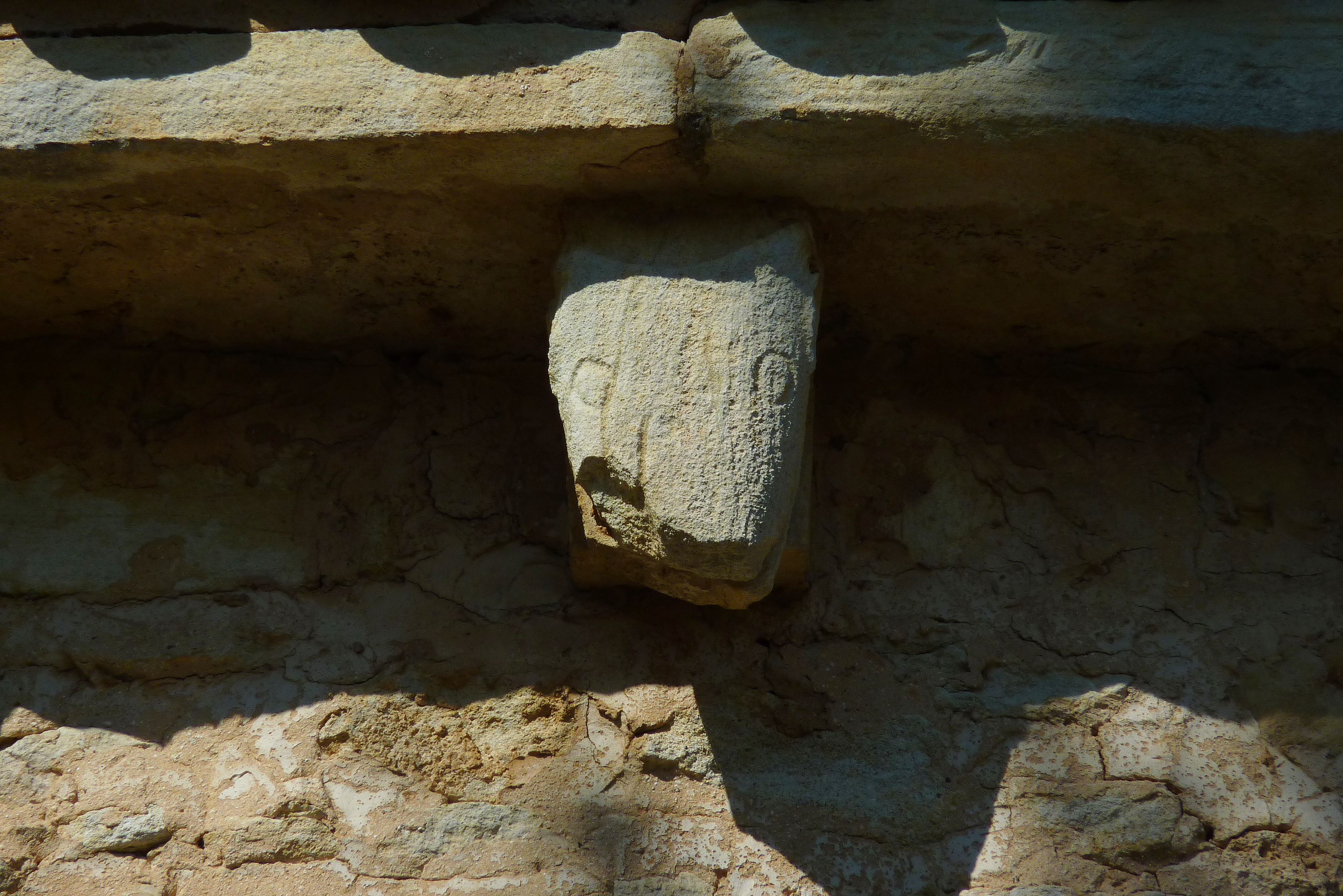 Romanische Kapelle Sainte-Madeleine in Bédoin, einer Gemeinde im Département Vaucluse in der französischen Region Provence-Alpes-Côte d’Azur, Kragsteinen unter dem Dachgesims in Form eines Tierkopfes